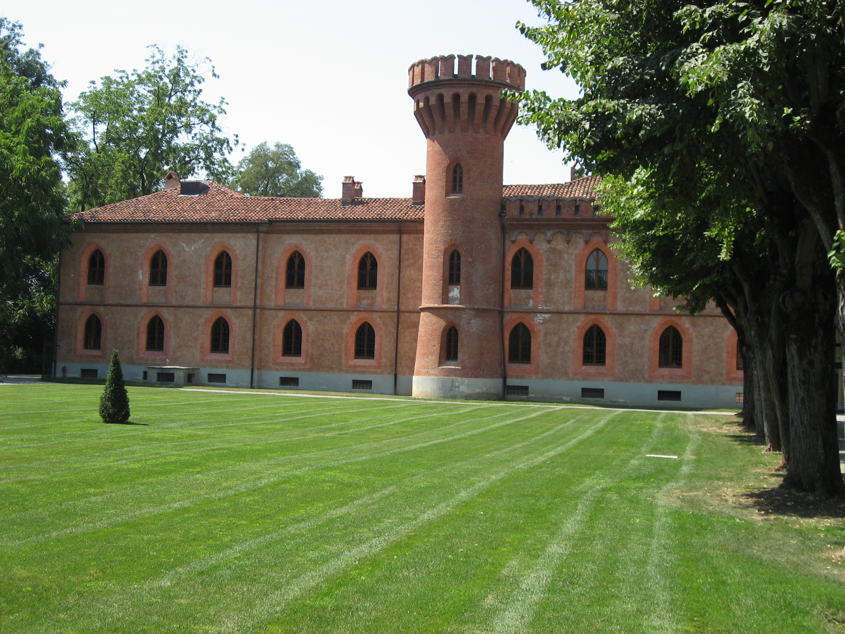 University of gastronomy in Pollenzo (Provincia di Cuneo, Piemonte, Italy)